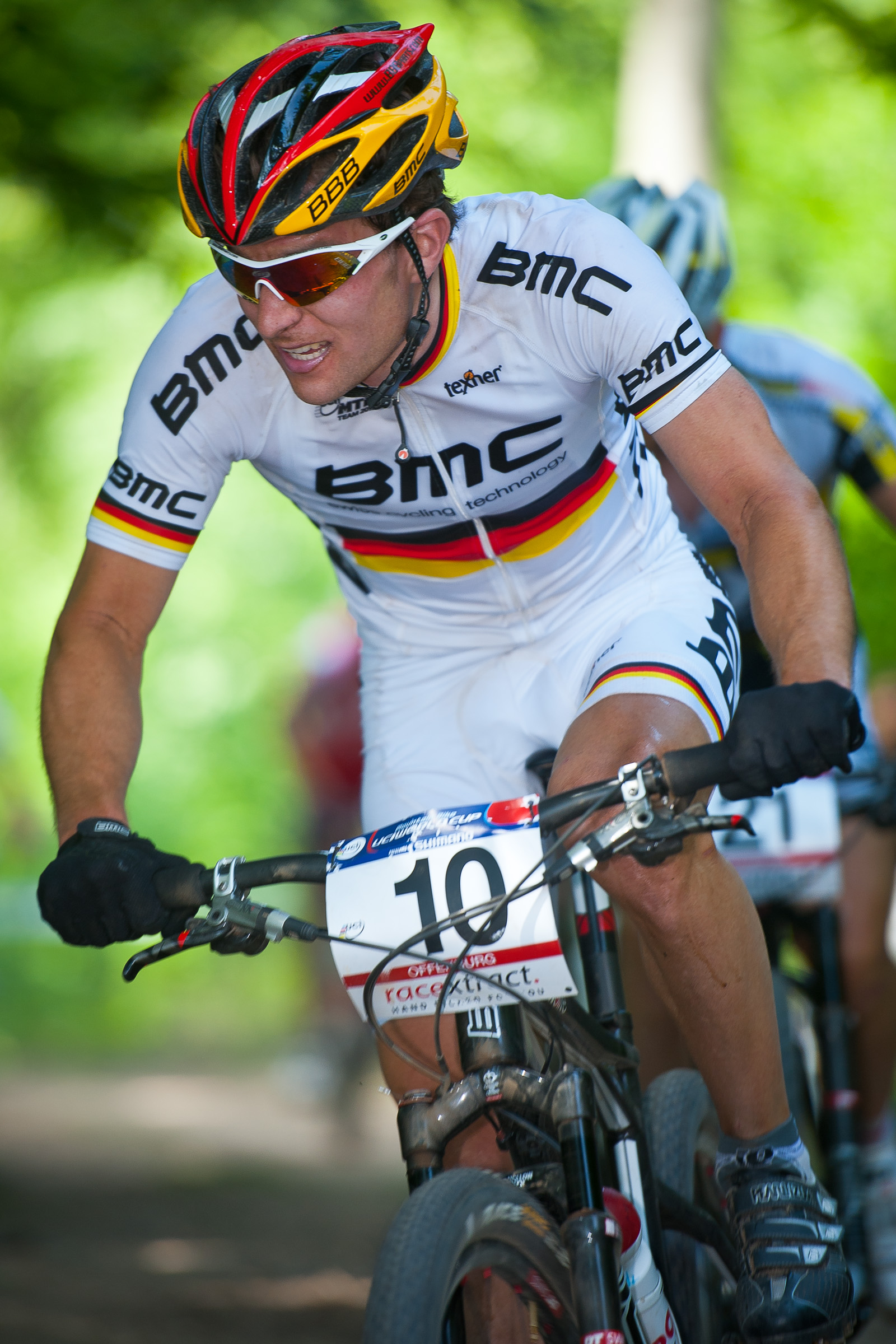 Milatz, Moritz, BMC MTB, , GER